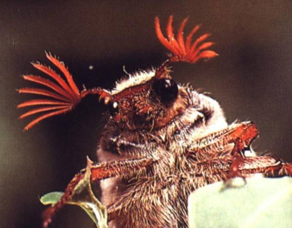 Samica chrząszcza majowego